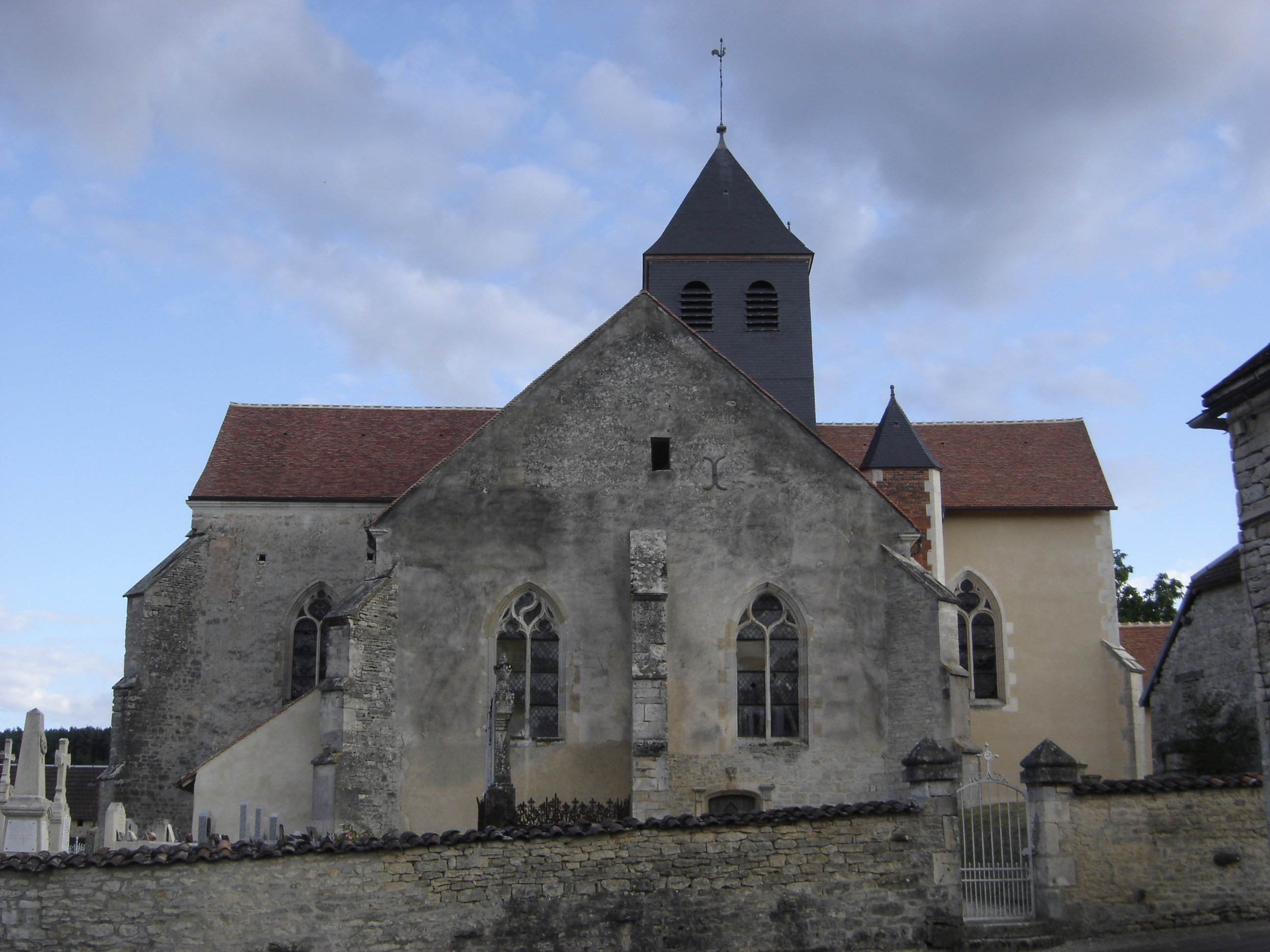 église de Chervey - Aube - France